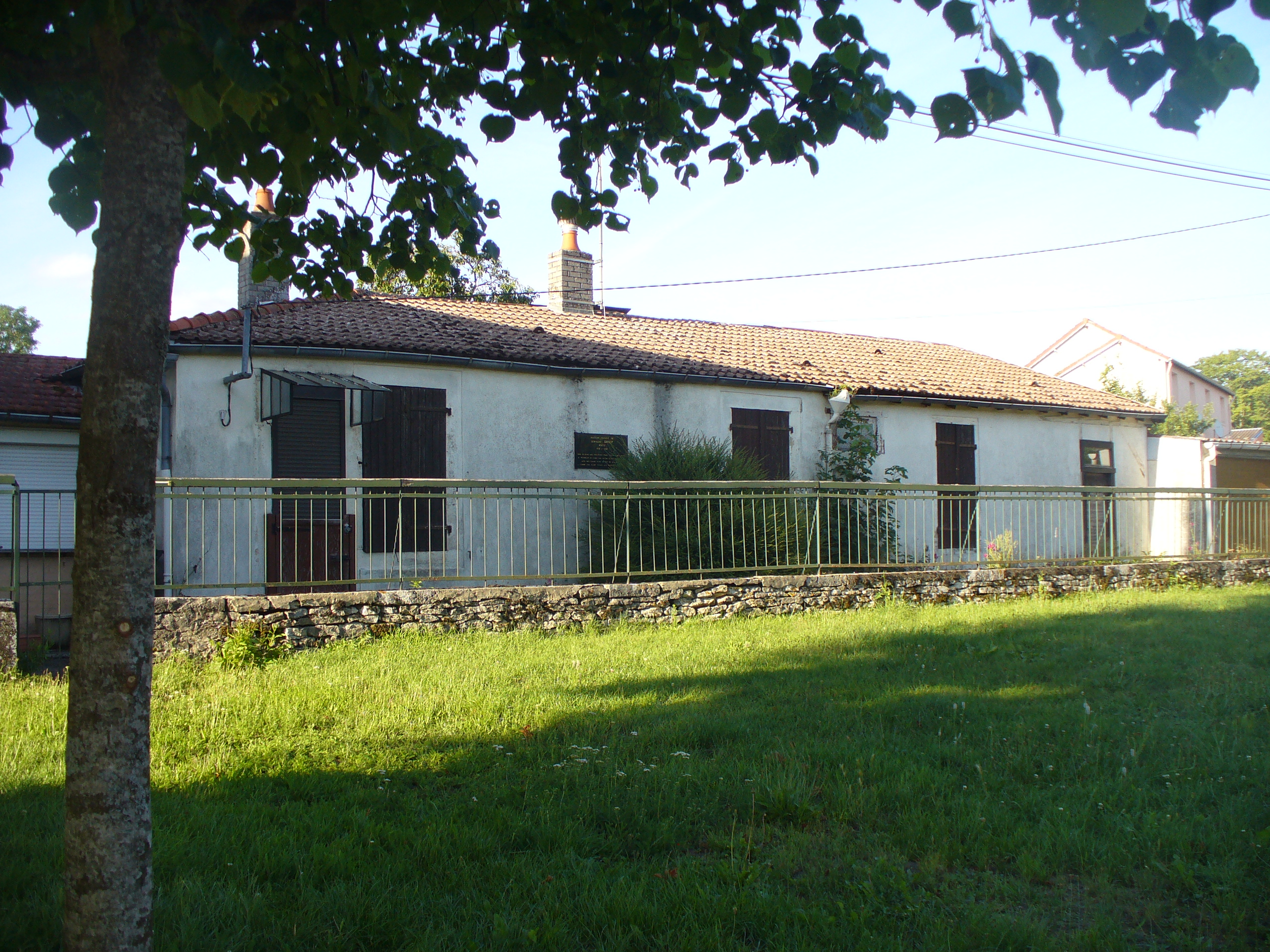 Maison natale de Bernard Dimey, avenue du 8 mai 1945 à Nogent (Haute-Marne).